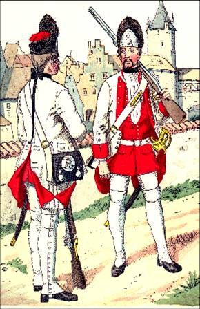 Uniform der Grenadiere im 1. Kreis-Infanterie-Regiment (kath.) (Fürstenberg) des Schwäbischen Reichskreises (Band V. Tafel 11